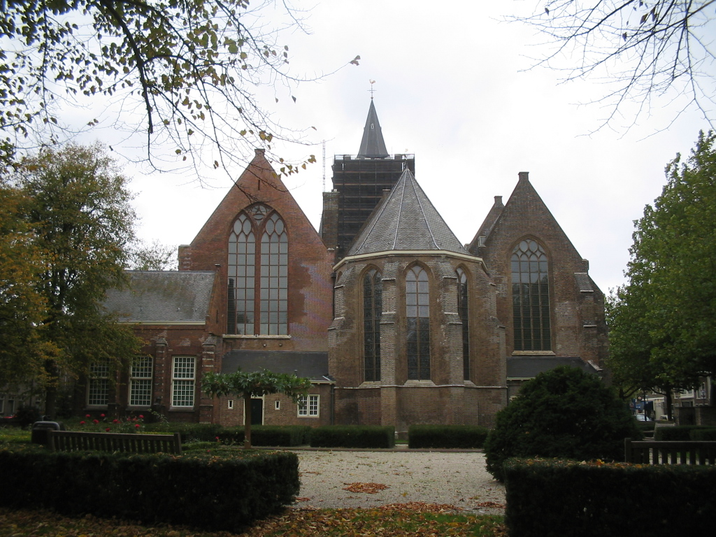 grote of St. Janskerk, Schiedam, 22 oktober 2005